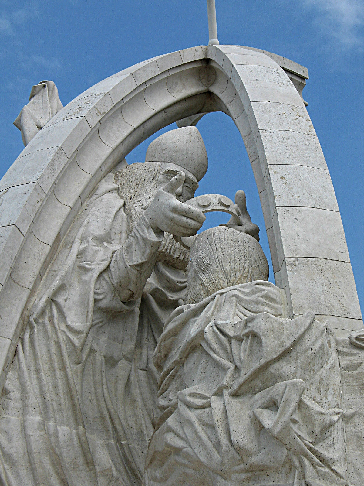 Detail z korunovacie